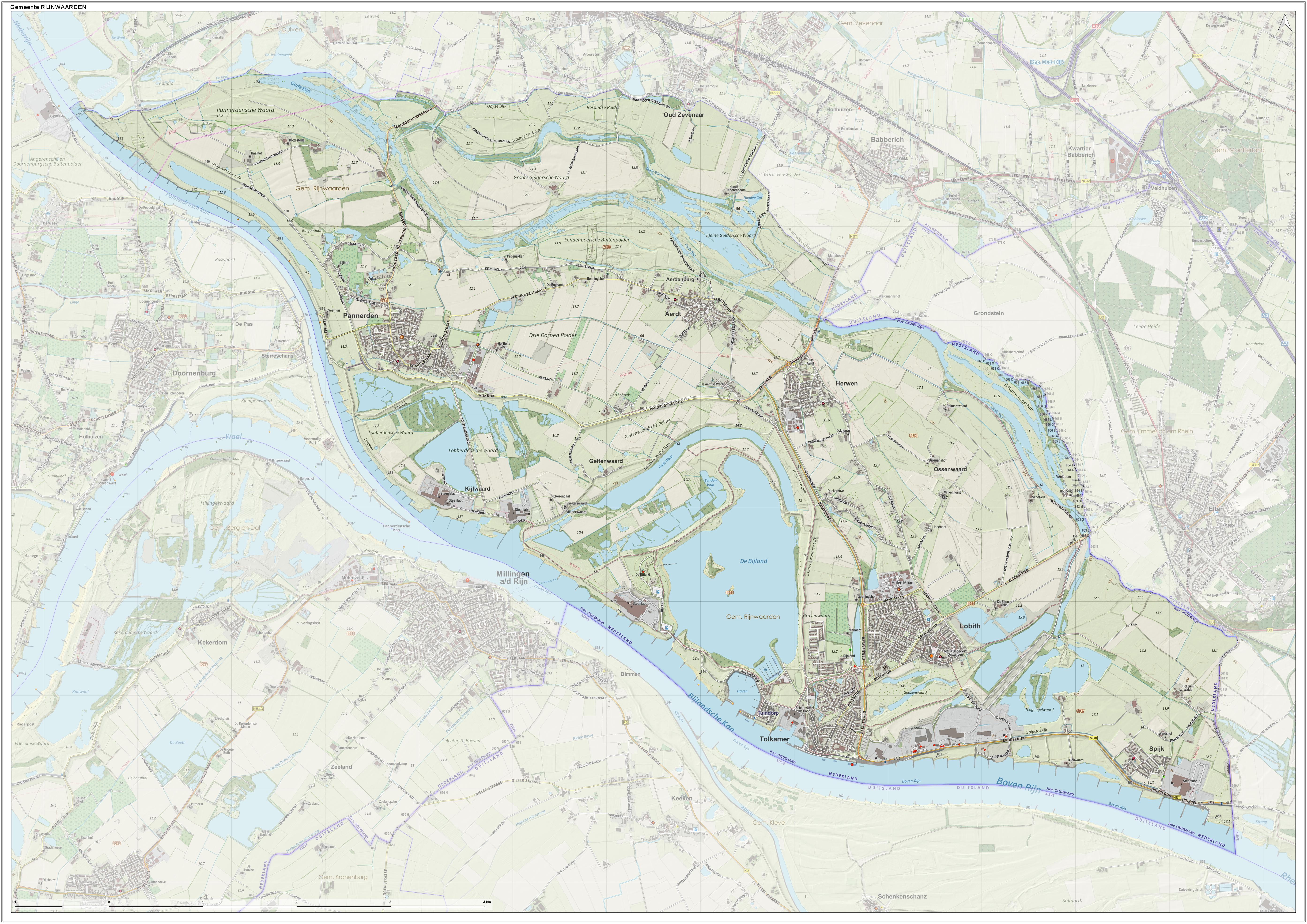 Topografische gemeentekaart. Resolutie: 400 pixels/km. Kaartbeeld samengesteld uit de open geodata van de Top10NL en Top25namen (Kadaster), Creative Commons-BY licentie. Gebouwvlakken uit open geodata BAG extract. Wegen uit de OpenStreetMap, OpenStreetMap community. Reliëfschaduw uit de Actuele Hoogtekaart AHN2. Samenstelling en kleurenschema: Jan-Willem van Aalst, met QGIS. Zie ook de Legenda.